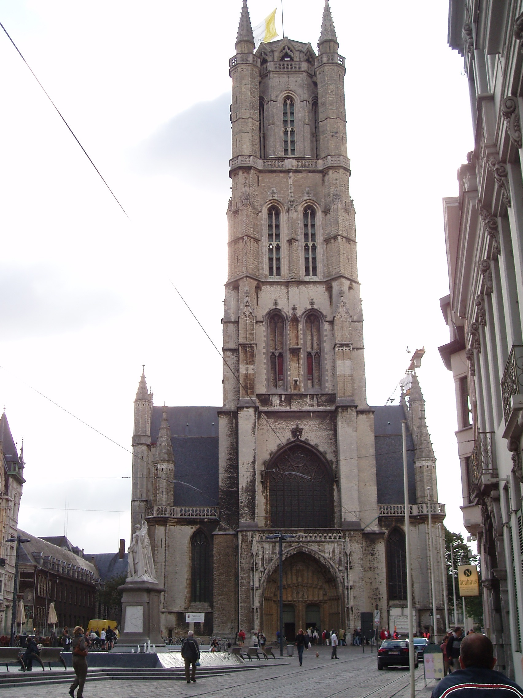 Church in Gent in Belgium